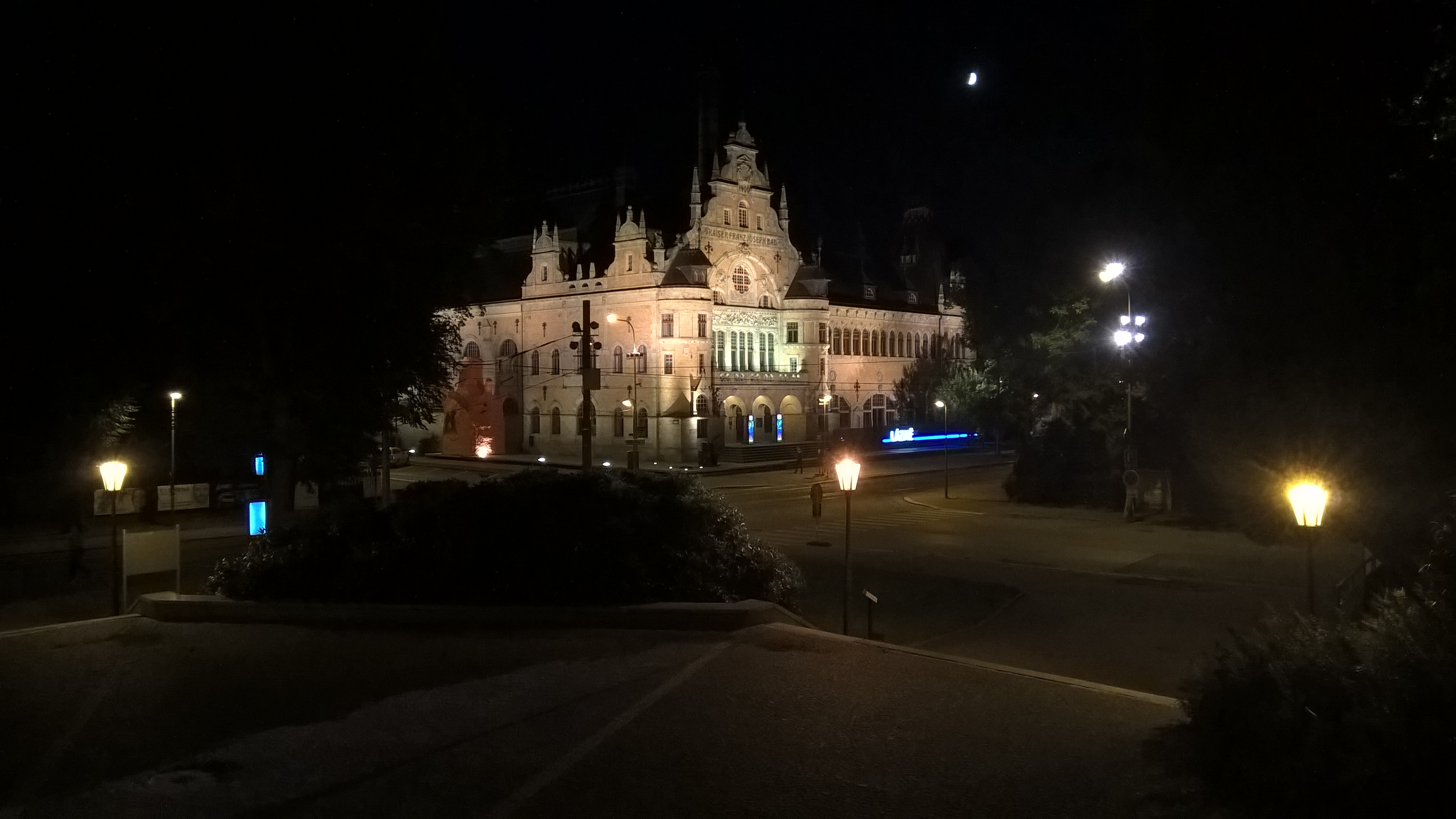 Liberec - galerie Lázně v noci